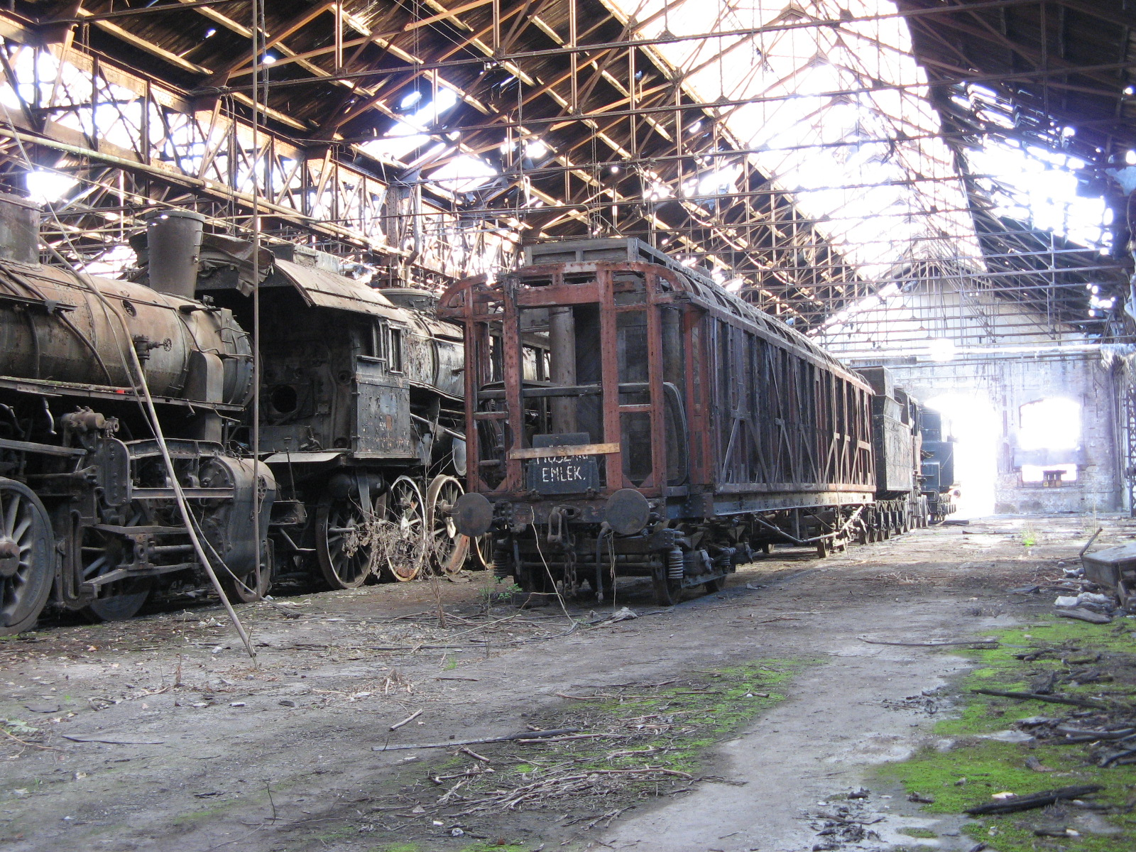 Budapest, Istvántelki Főműhely